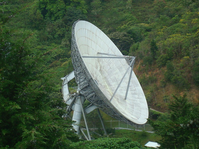 Antena parabólica del Instituto Costarricense de Electricidad, ubicada en el distrito de Tarbaca, Aserrí, Costa Rica.